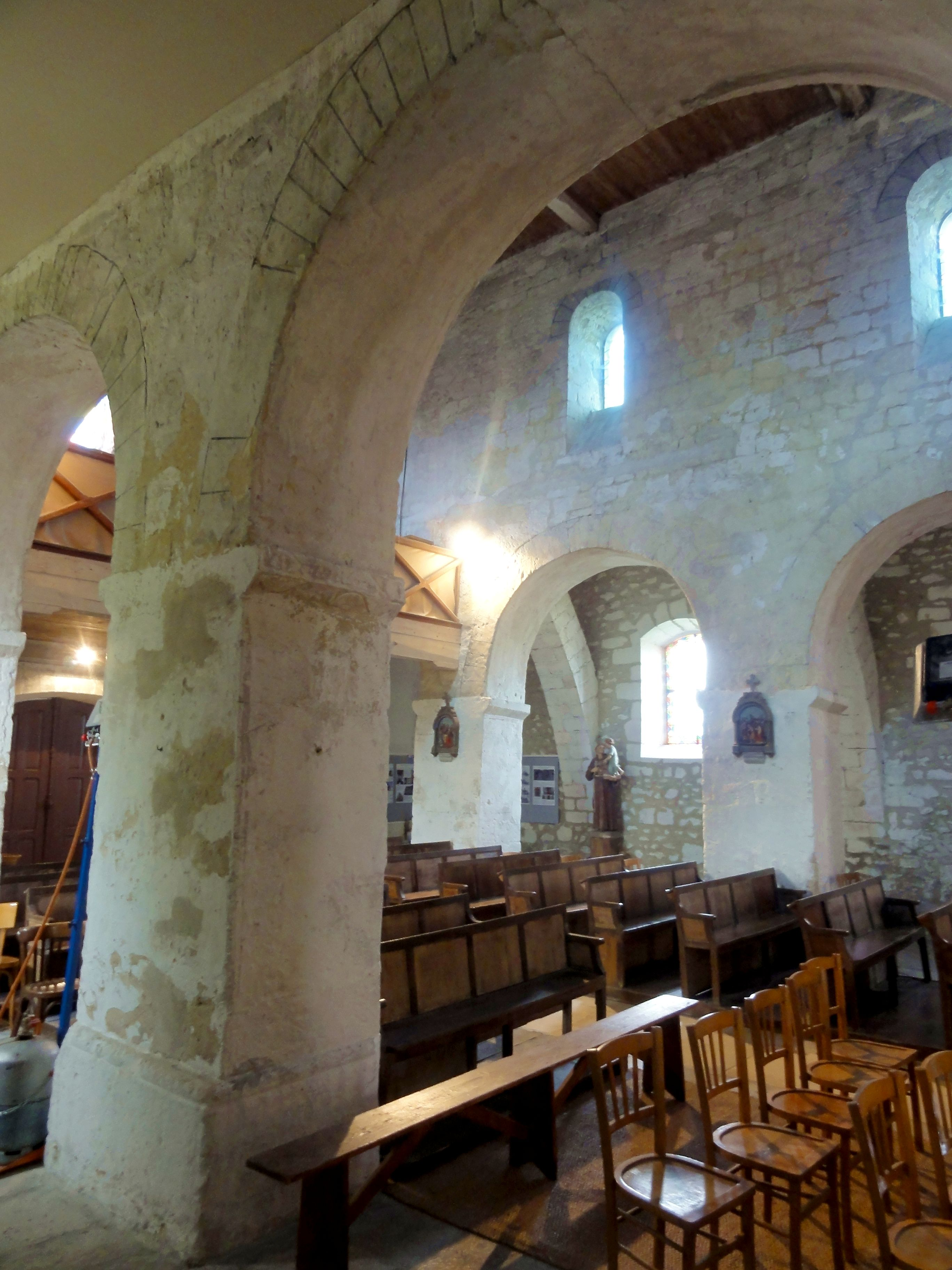 Nef, élévation nord.